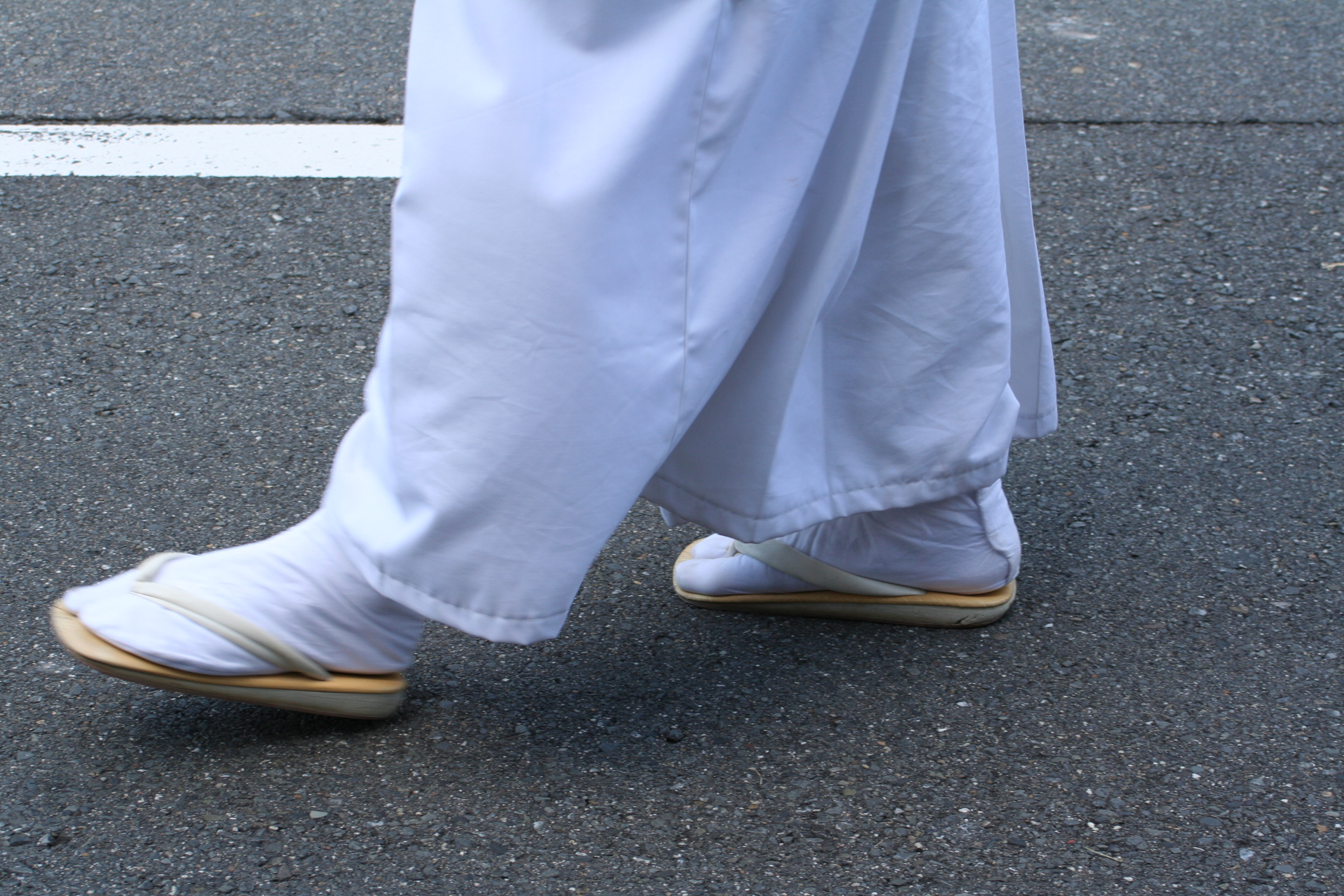 京都府京都市にて開催された時代祭。正午の御所から平安神宮までの行進の様子。2009年10月22日撮影。